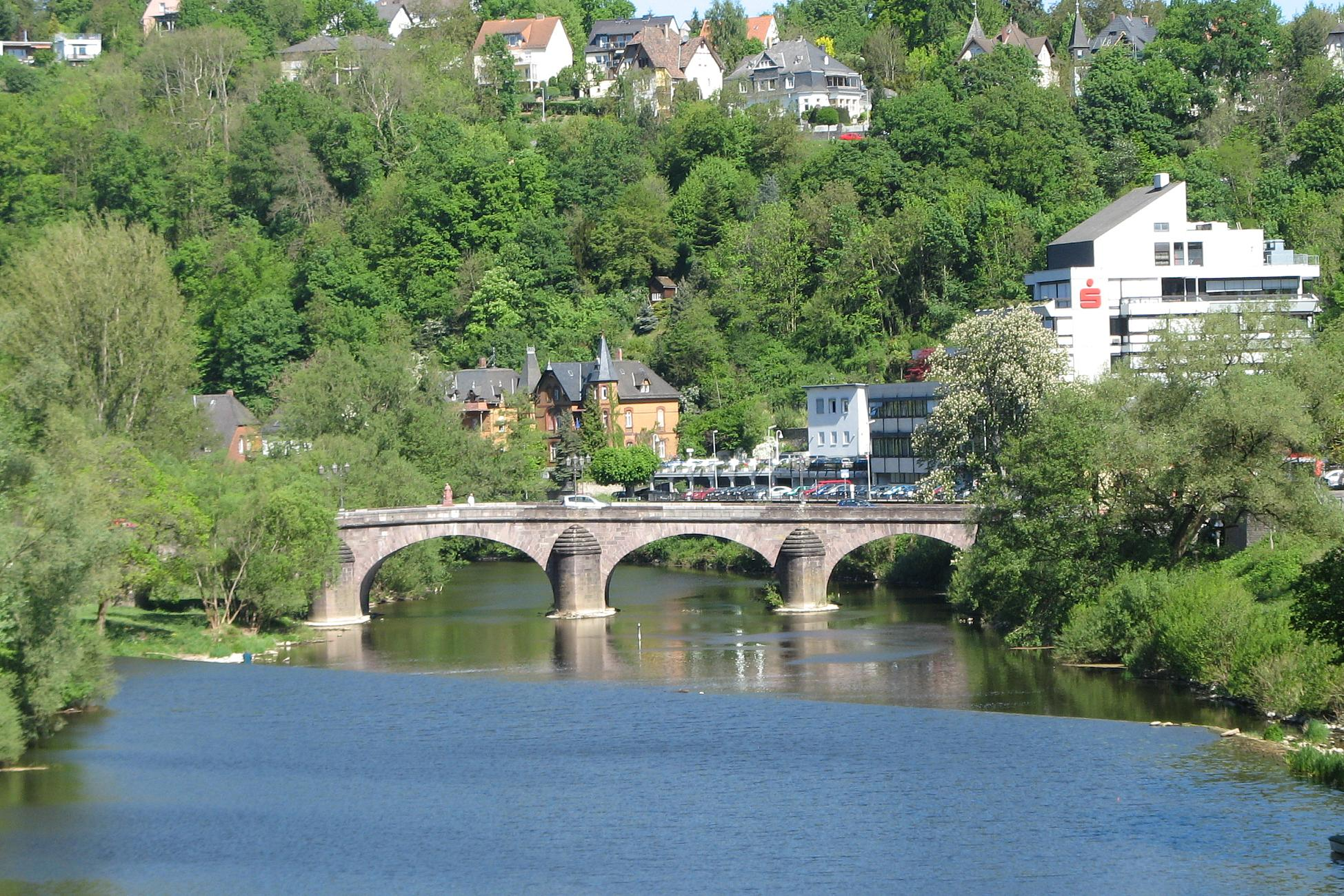 Die Steinerne Brücke in Weilburg. Zwei der Bögen sind durch den Bewuchs auf der Lahninsel verdeckt.